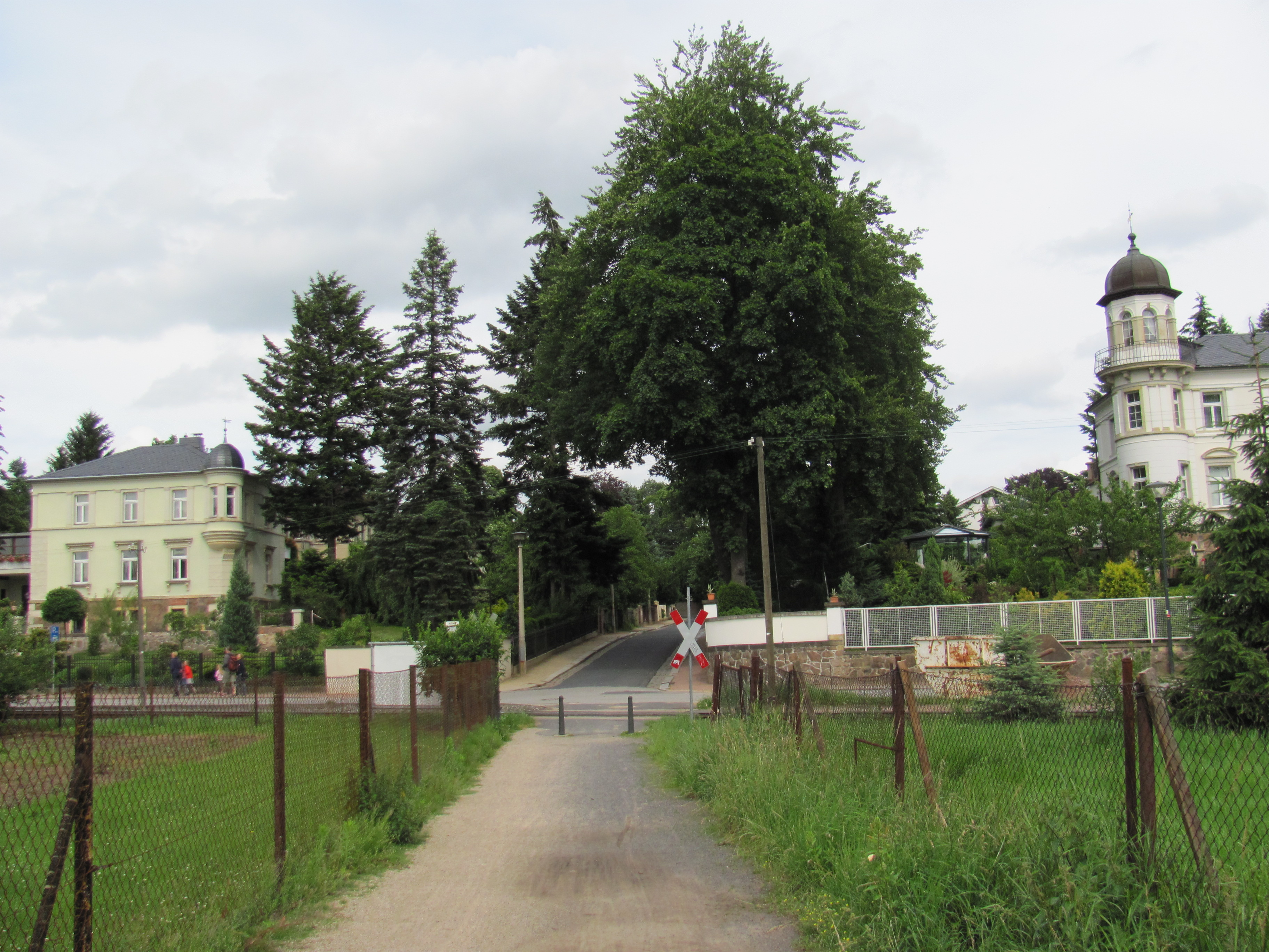 Radebeul, Nizzastraße, getürmter Eingang nach Oberlößnitz. Kreuzung mit Mühlweg und Lößnitzdackel